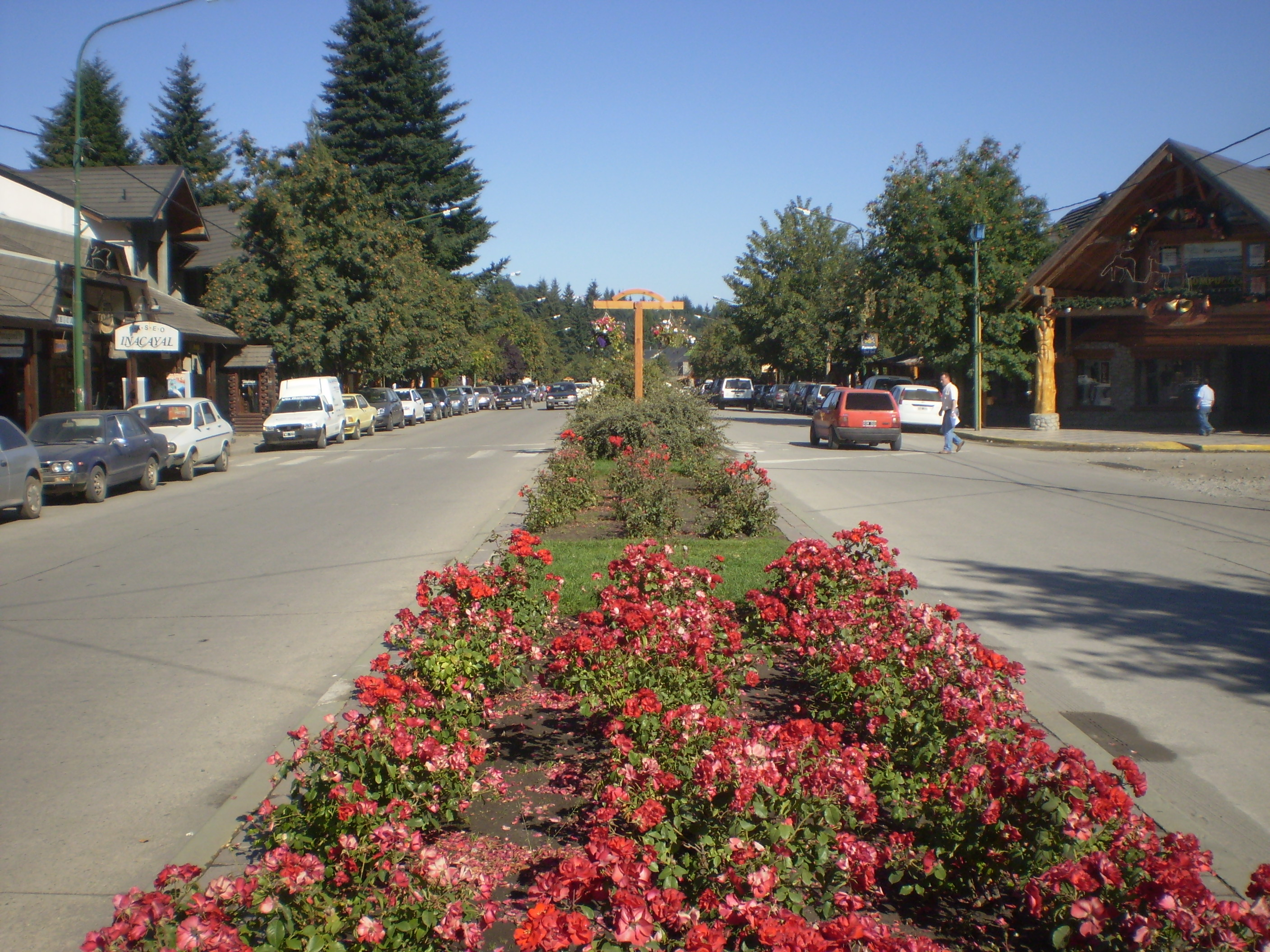 Avenida Arrayanes en Villa La Angostura, Neuquén, Argentina